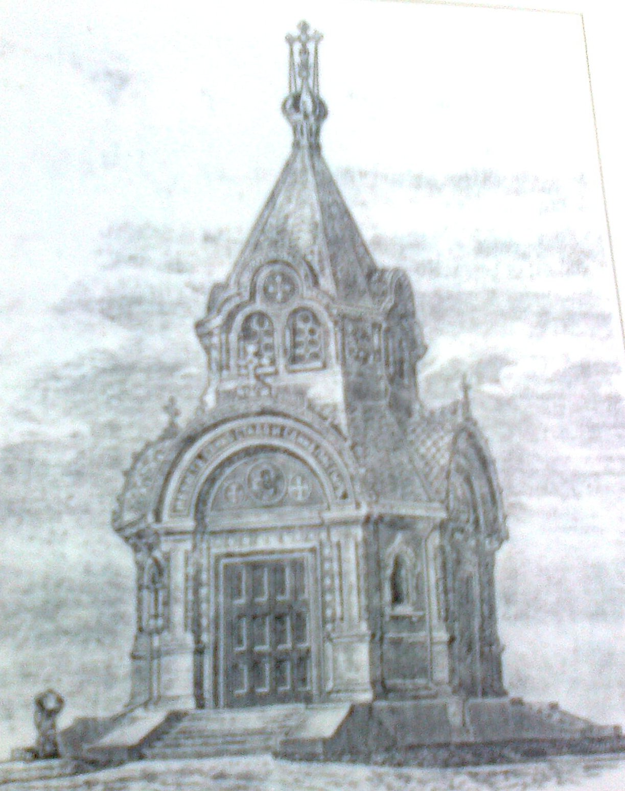 Cerkiew św. św. Cyryla i Metodego w Chełmie, wzniesiona ku pamięci likwidacji unickiej diecezji chełmskiej, rozebrana po 1918